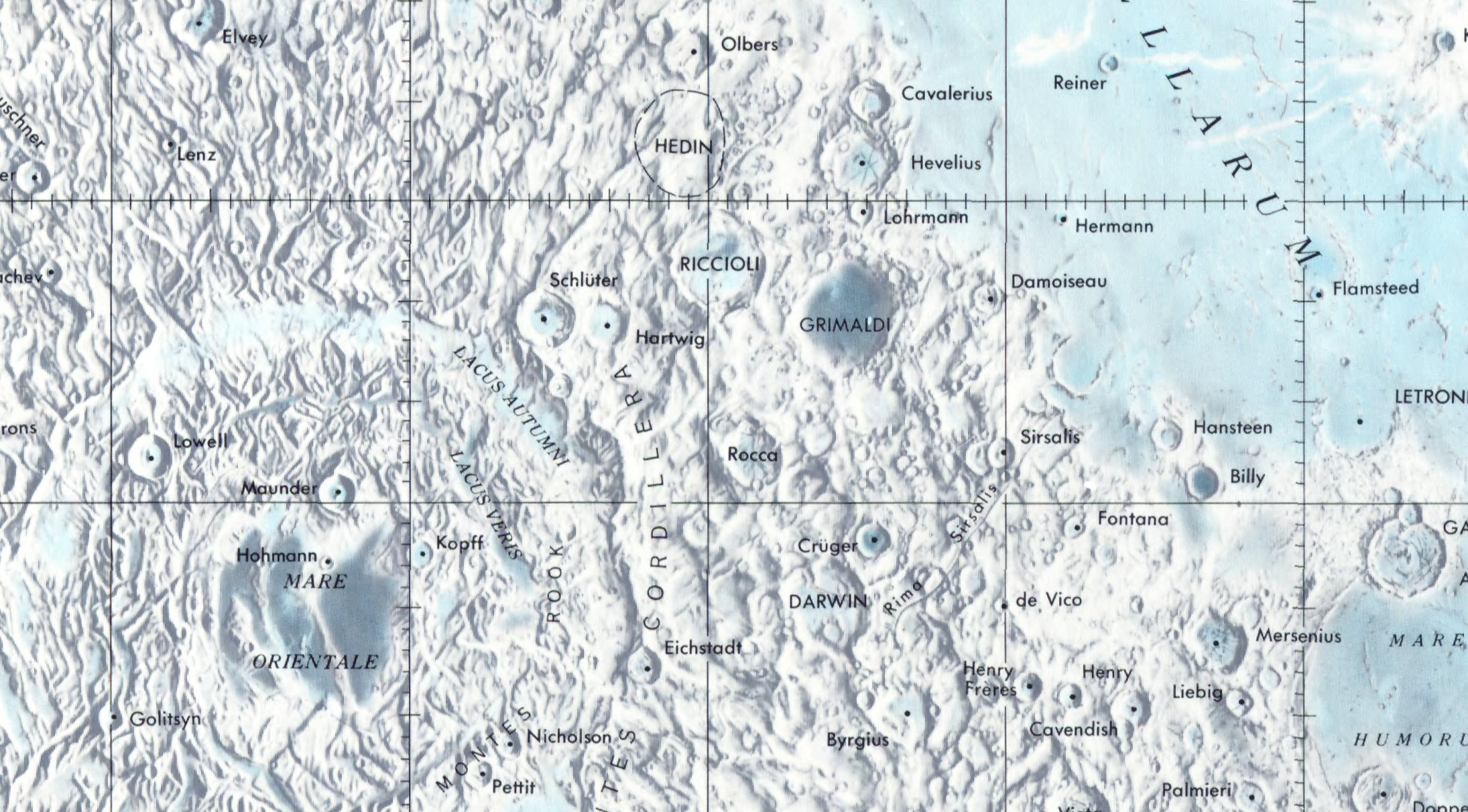 Cráter lunar Rocca. Localización. (Lunar Chart LPC1. Second Edition)